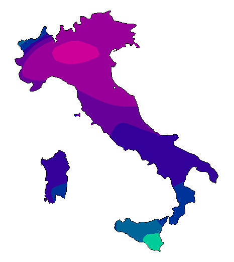 Carta della radiazione solare globale in Italia in febbraio 12 MJ/mq